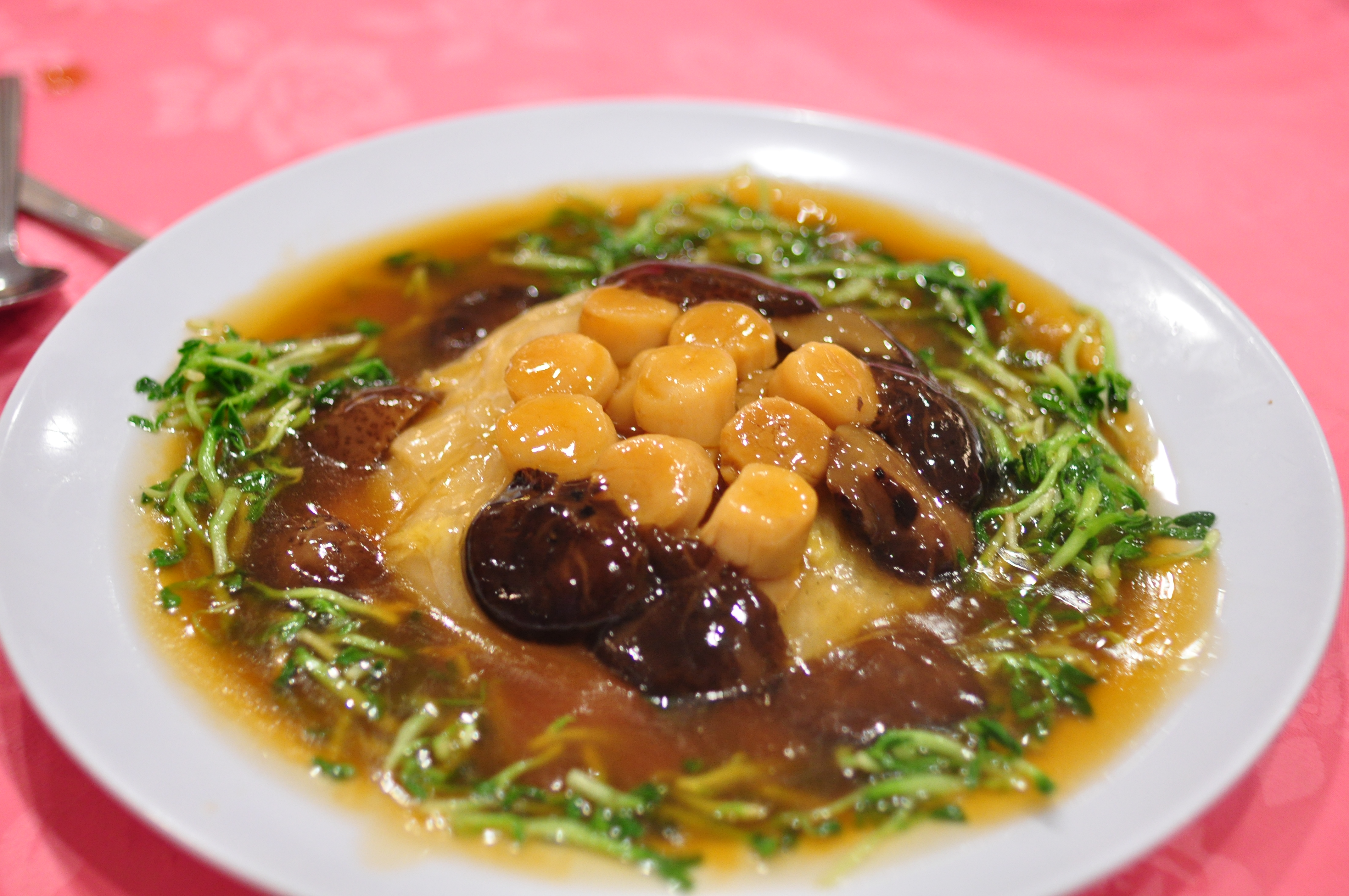 焖白菜